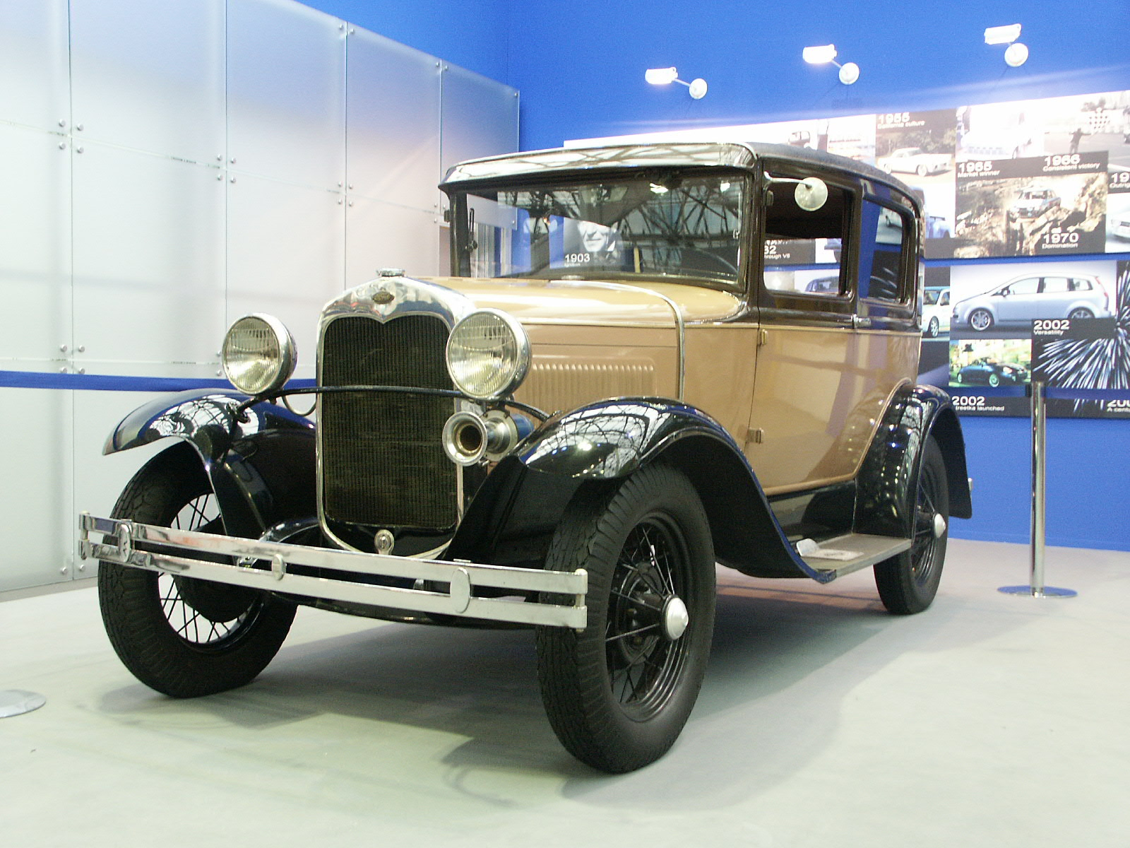 Форд-A с кузовом тудор, сборки завода КИМ